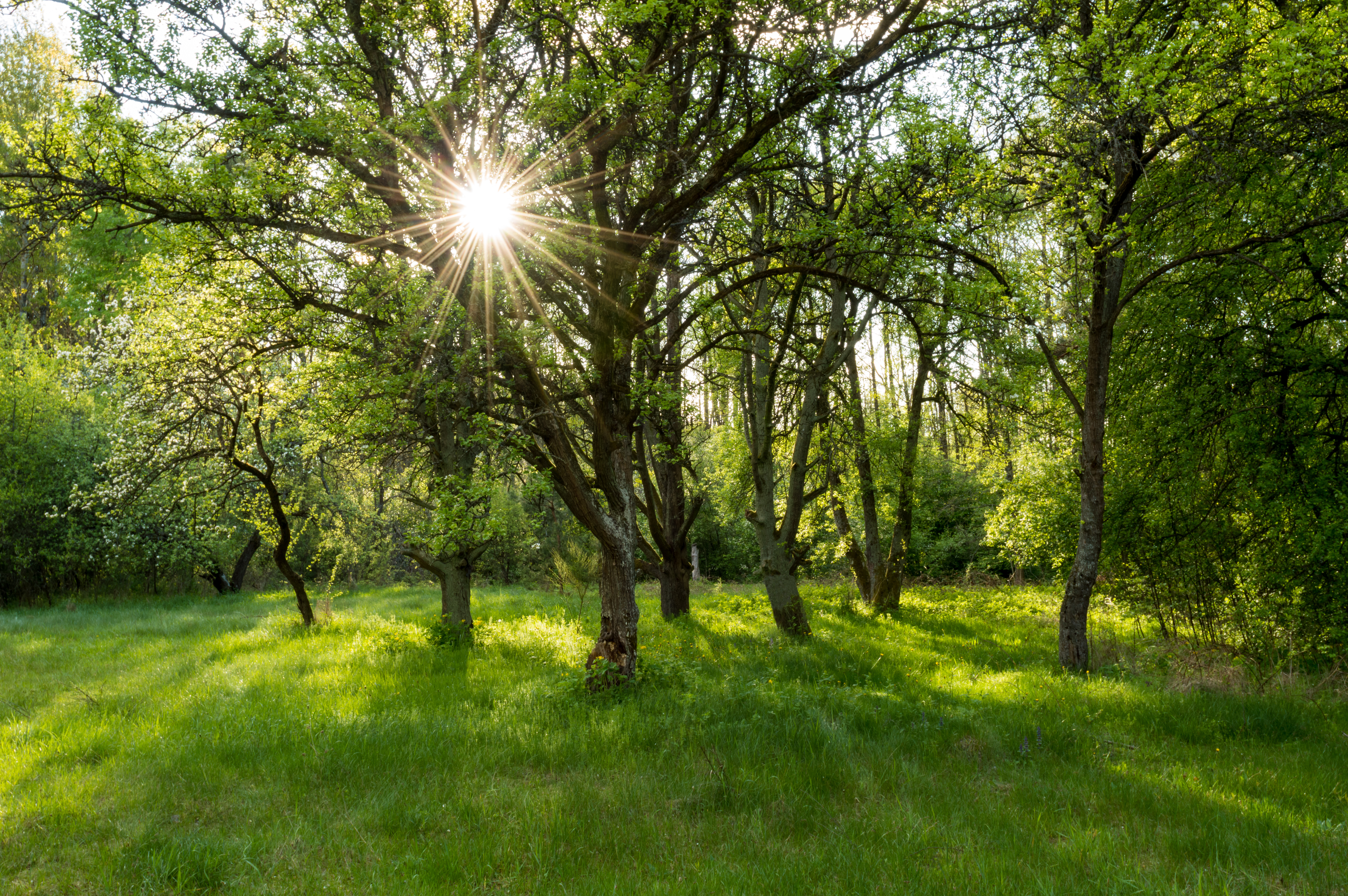 «Шацький», Шацький національний природний парк, ДП «Шацький учбово-досвідний лісгосп»